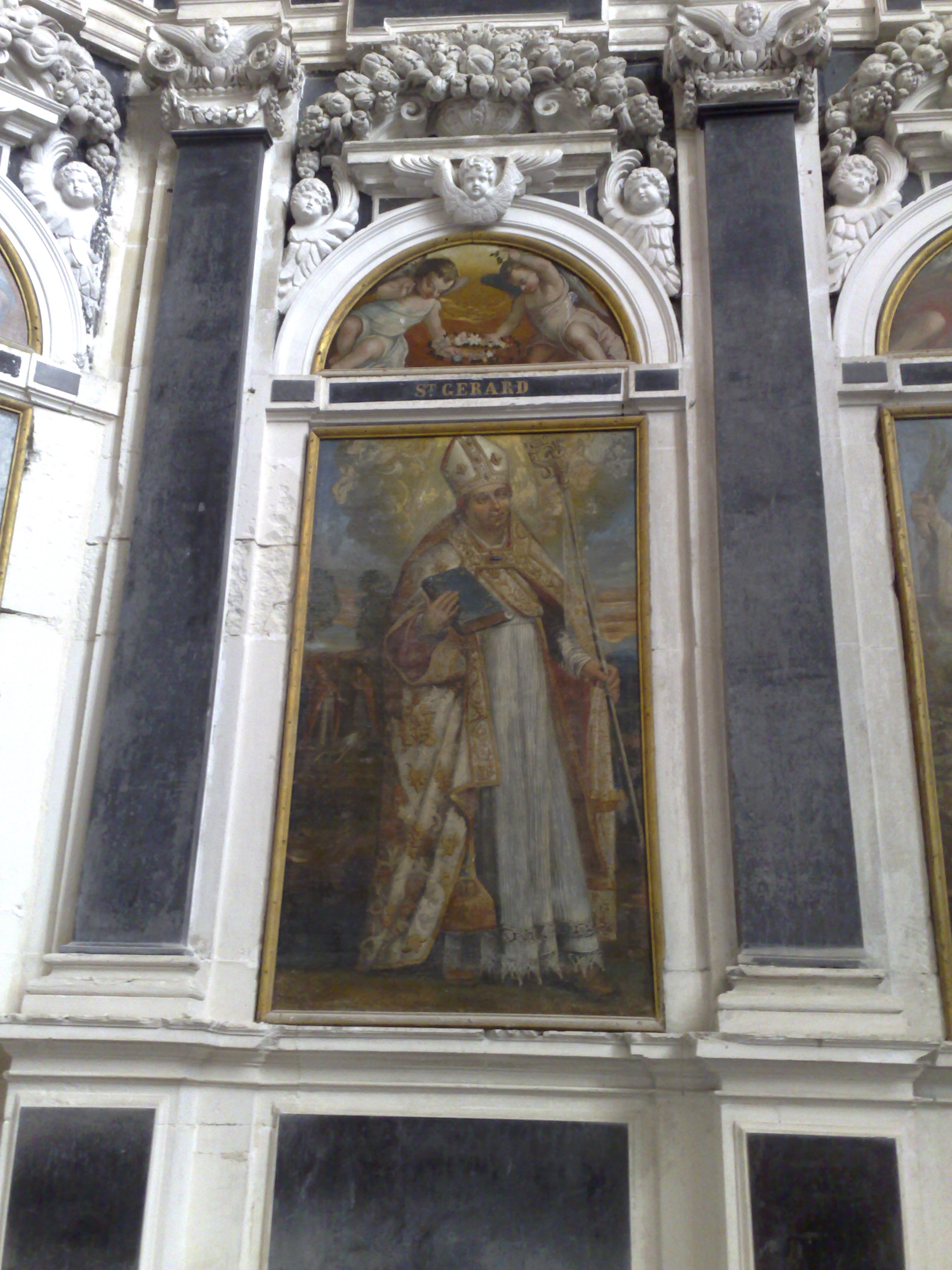 Toul (Meurthe-et-Moselle, France), cathédrale St Étienne, Saint Gérard, évêque de Toul par Rémond CONSTANT, 1625.